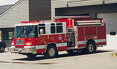 US-Feuerwehrfahrzeug (Eagle River Fire District, Colorado)